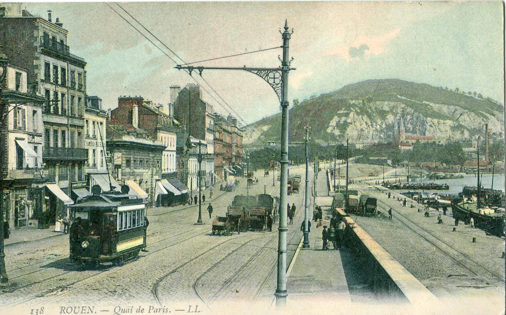 Carte postale ancenne éditée par LL, n°138 ; ROUEN - Quai de Paris